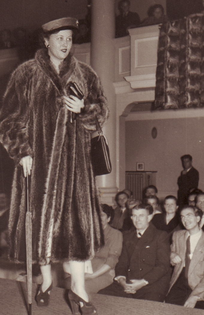 Pelzmodelle Fahnenstich, Recklinghausen :Modenschau in Herne, etwa 1952 :Ausgelassen verarbeiteter Waschbärmantel